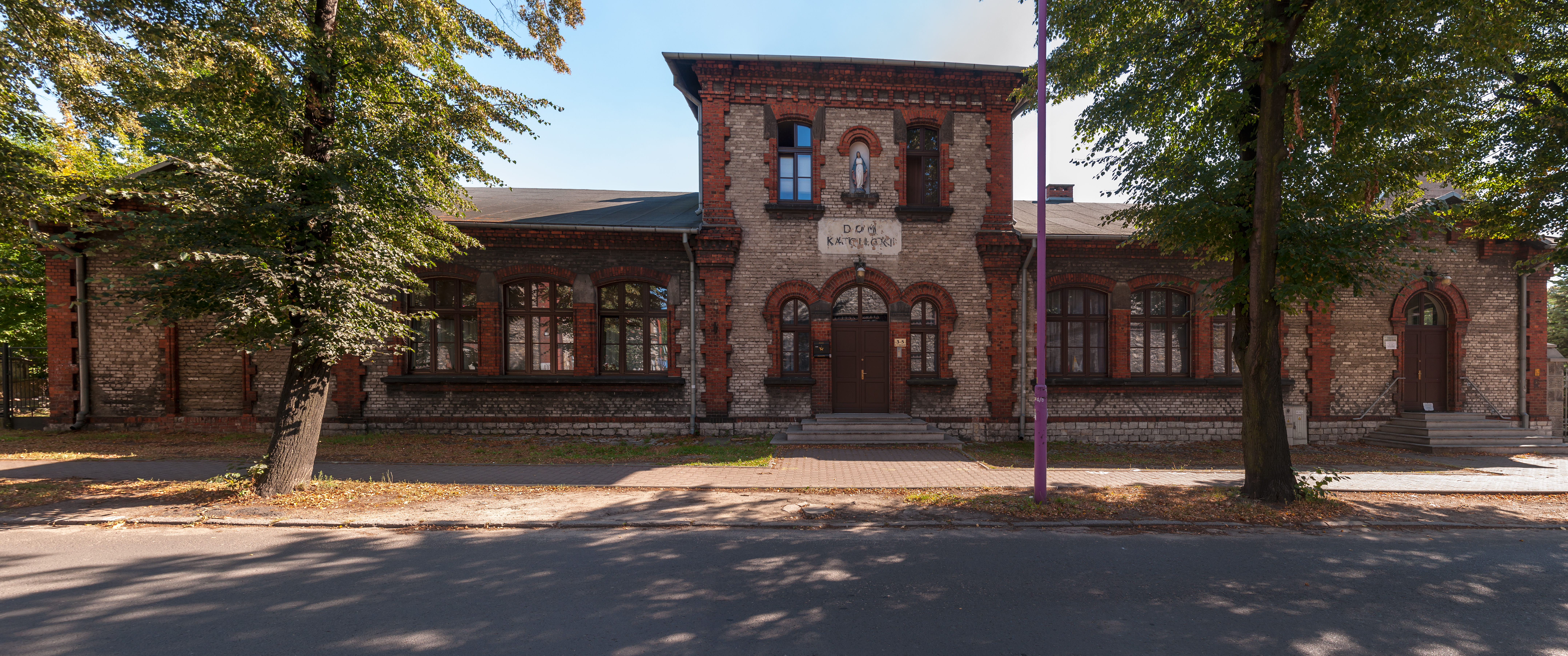 Czeladź, ul. Kościuszki 3. Szkoła, ob. dom katolicki, 1922-1924.